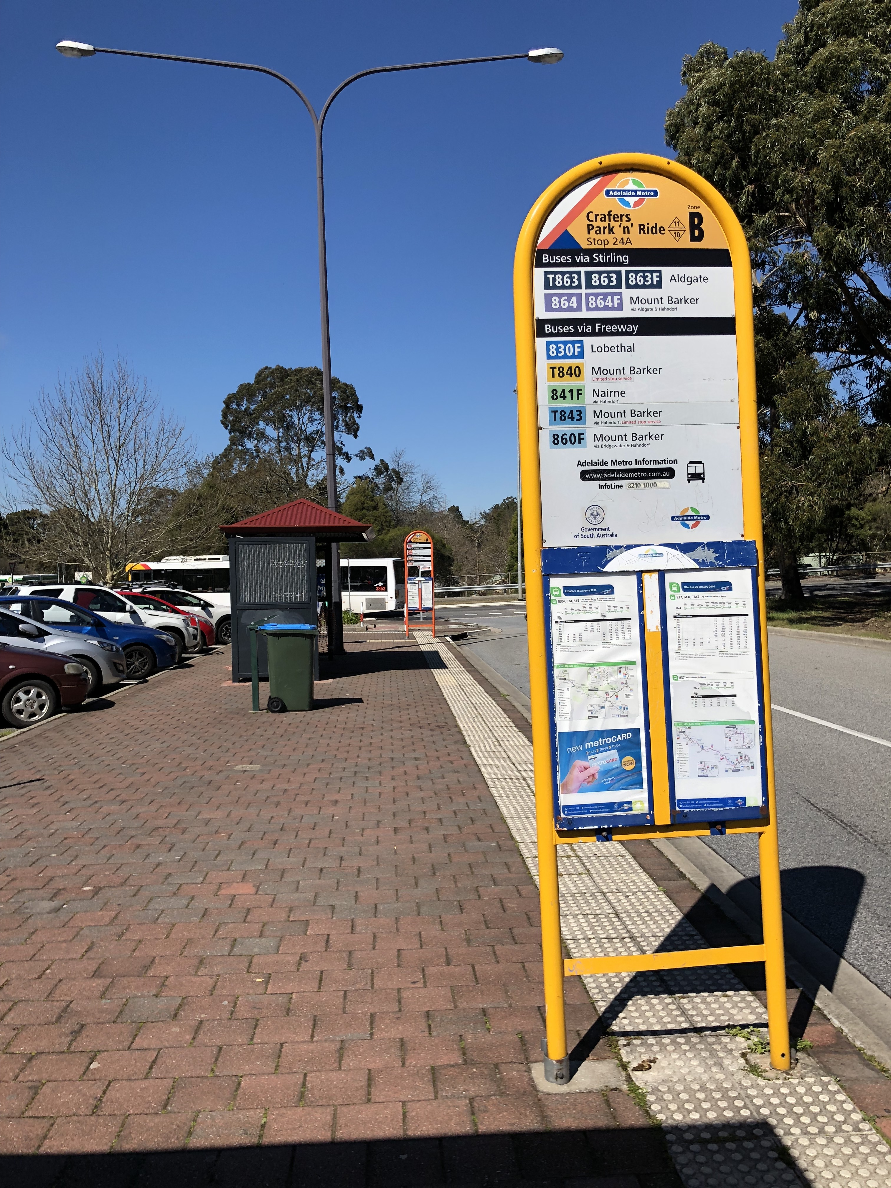 中文（香港）: 嘉佛士轉乘巴士泊車處（Crafers Park 'n' Ride）是嘉佛士一個公共運輸交匯處，不少東南郊區居民都會將汽車停泊於此，轉乘巴士到阿德萊德。